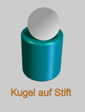 Verbindung Kugel auf Stift